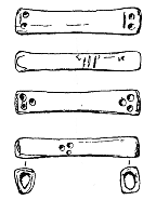 Abzeichnung der verschiedenen Seiten des Ballinderry-Würfels, der 1933 bei Ausgrabungen des Crannóg Ballinderry Nr. 2, Grafschaft Offaly, Irland, entdeckt wurde. Es handelt sich um einen länglichen Würfel aus Knochen, der auf einer seiner vier mit Zahlenwerten versehenen Seiten statt Punkten ein Ogham-Zeichen aufweist. Er wird ins 8. bis 10. Jahrhundert n. Chr. datiert.